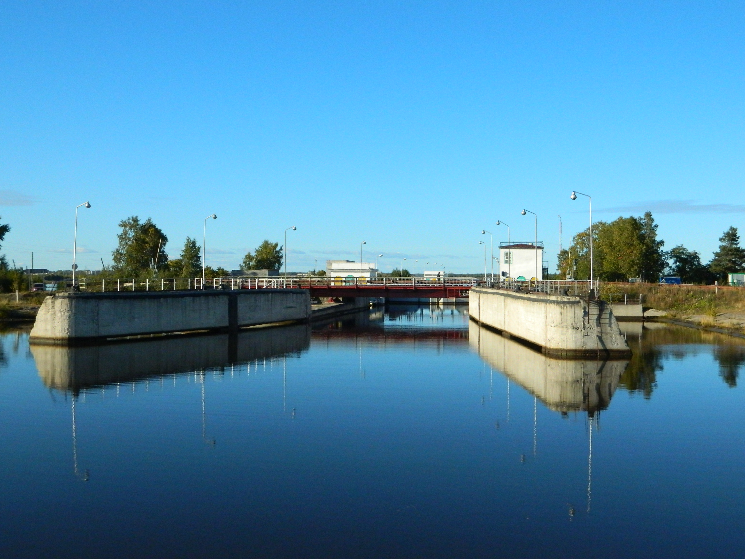 Шлюз № 19 Беломорканала в Беломорске